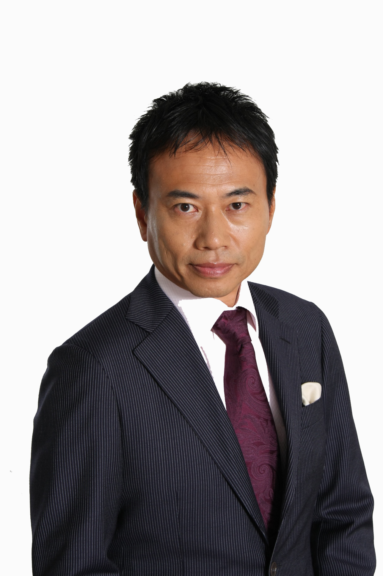 堀井計のプロフィール画像